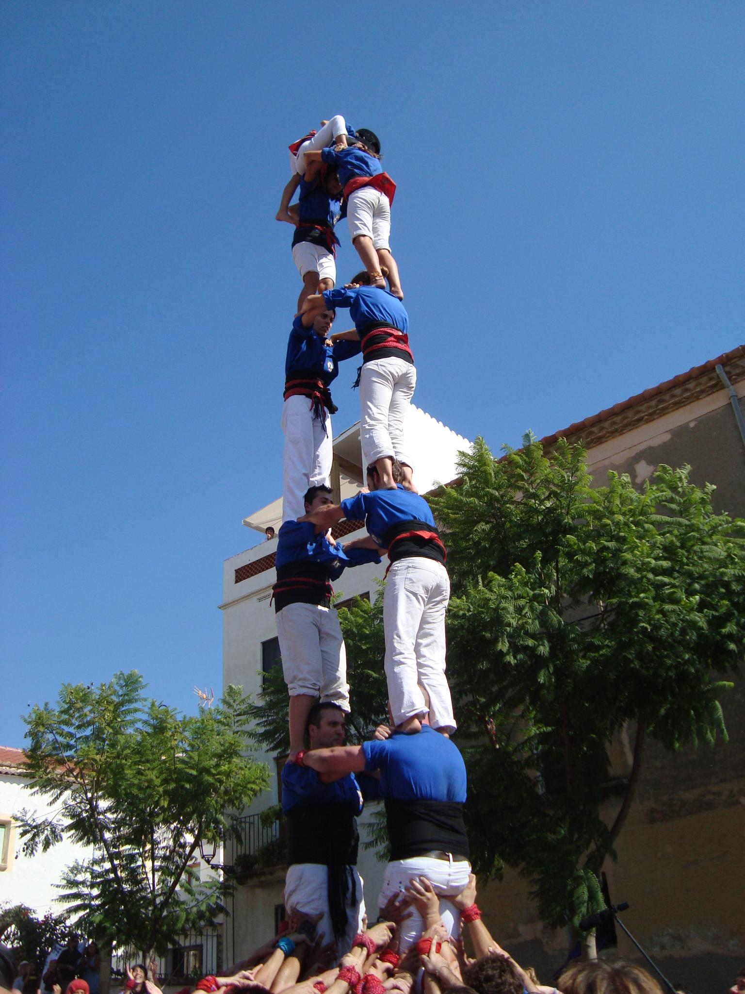 2d7 carregat pels Castellers d'Esplugues al Concur7 2011